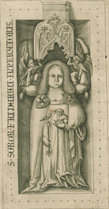 Judith von Schwaben